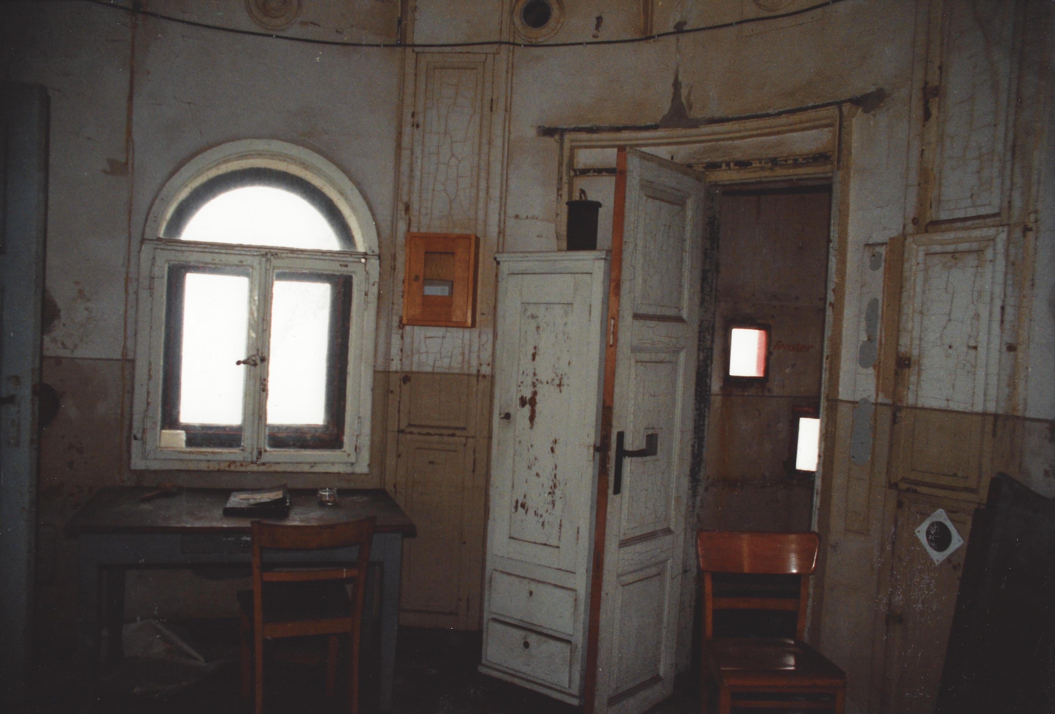 Fotografie des Innenraums vom Leuchtturm Roter Sand vor der Restaurierung.